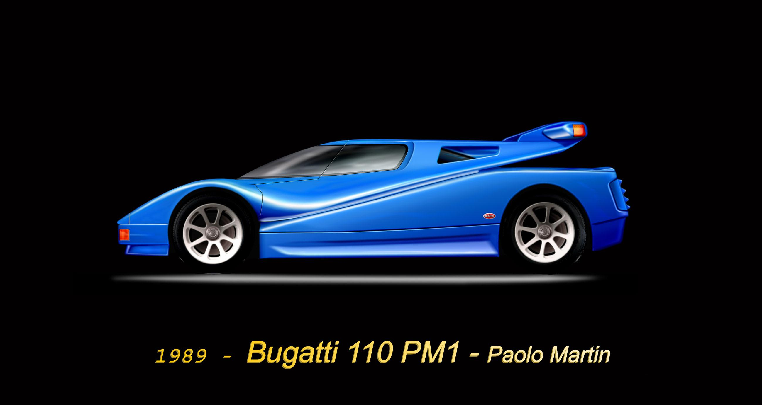 Figurino scala 1-10 su telaio Bugatti EB 110